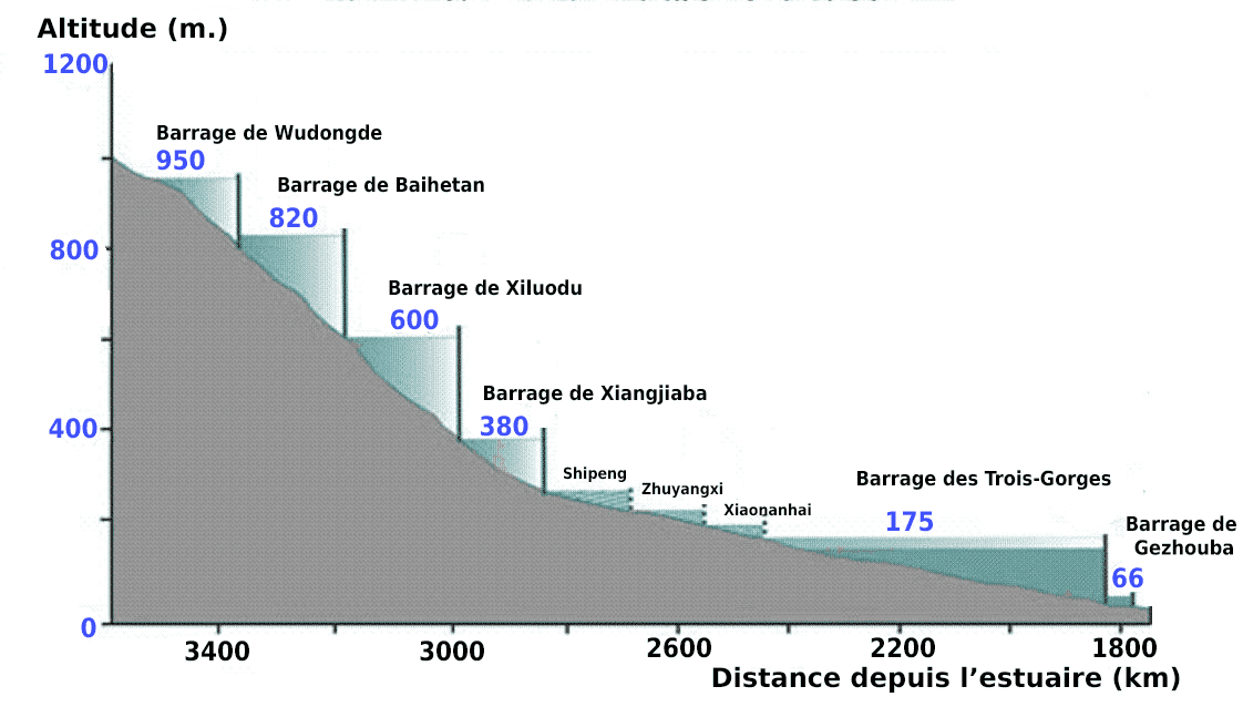 Profil du cours supérieur du Yangzi Jiang et position des barrages